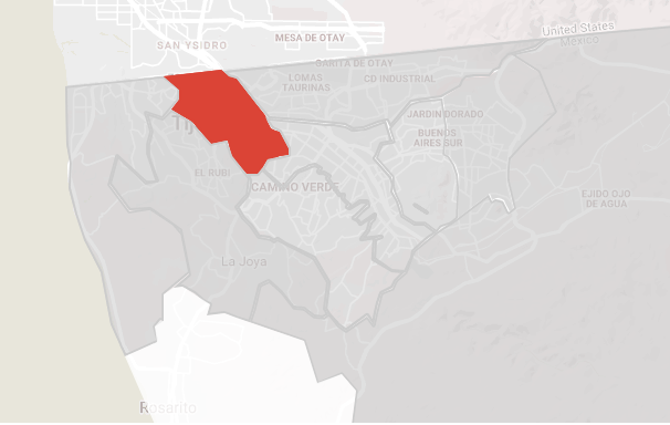 Demarcación de la delegación Centro en Tijuana